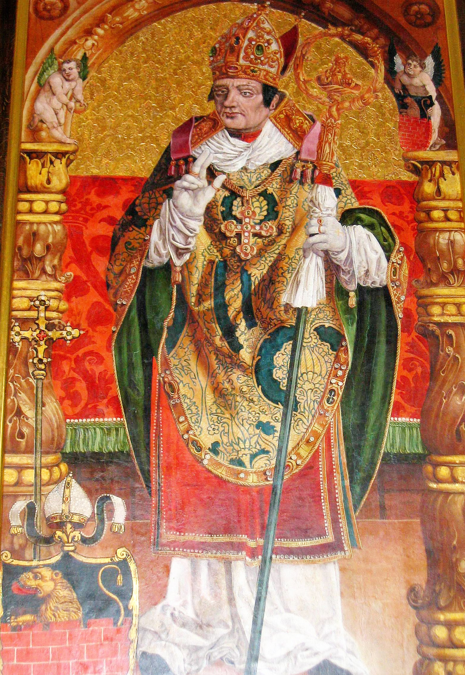 Jan Latalski Bishop of Kraków anonymous painting from XVI century author-Maciej Szczepańczyk user:Mathiasrex